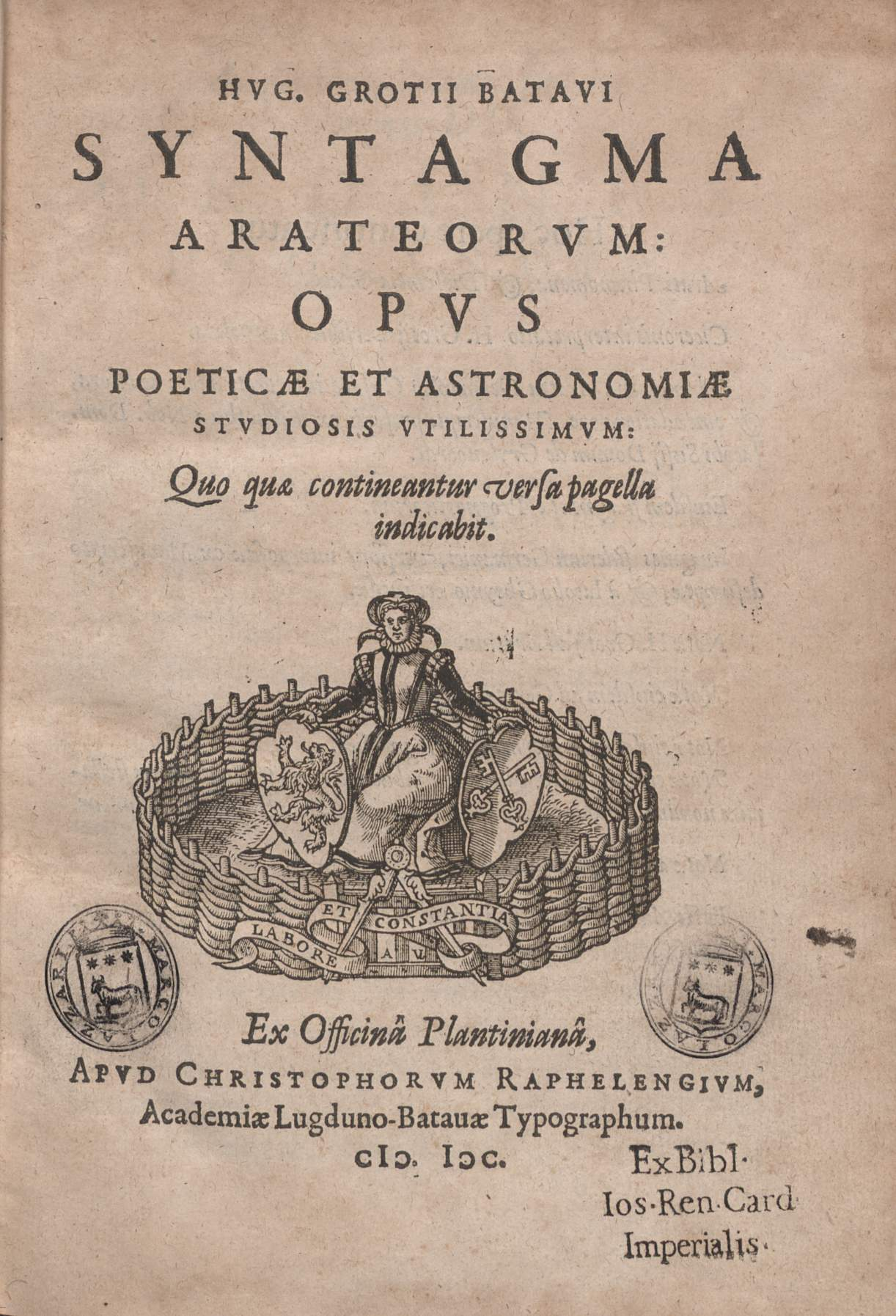 Hug. Grotii Bataui Syntagma Arateorum: opus poeticae et astronomiae studiosis vtilissimum: quo quae contineantur versa pagella indicabit. - [Leiden] : ex officina Plantiniana : apud Christophorum Raphelengium Academiae Lugduno-Batauae typographum, 1600